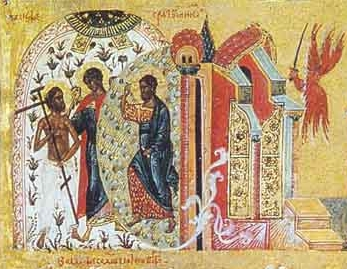 Russian icon with 5 themes. Fragment: Good Felon enters in Heaven; Пятичастная икона, фрагмент. Благоразумный разбойник в раю